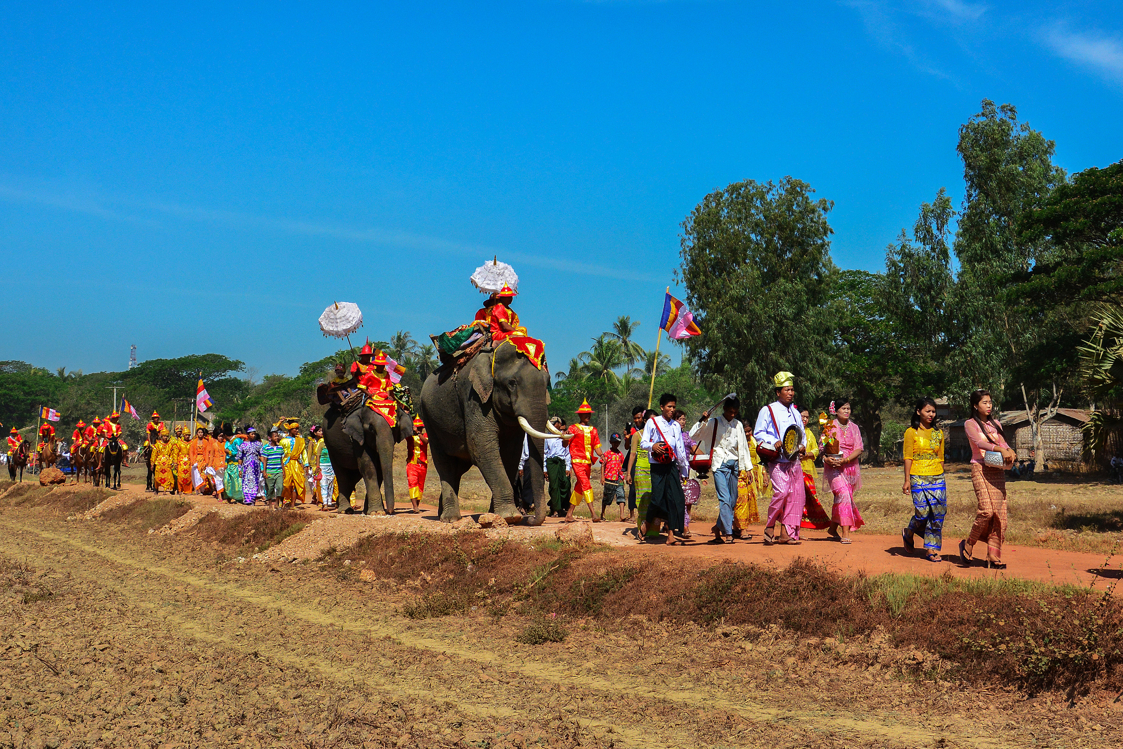 မြန်မာဘာသာ: ရှင်လောင်းလှည့်